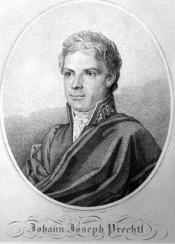 Johann Joseph von Prechtl im Alter um die 40 Jahre